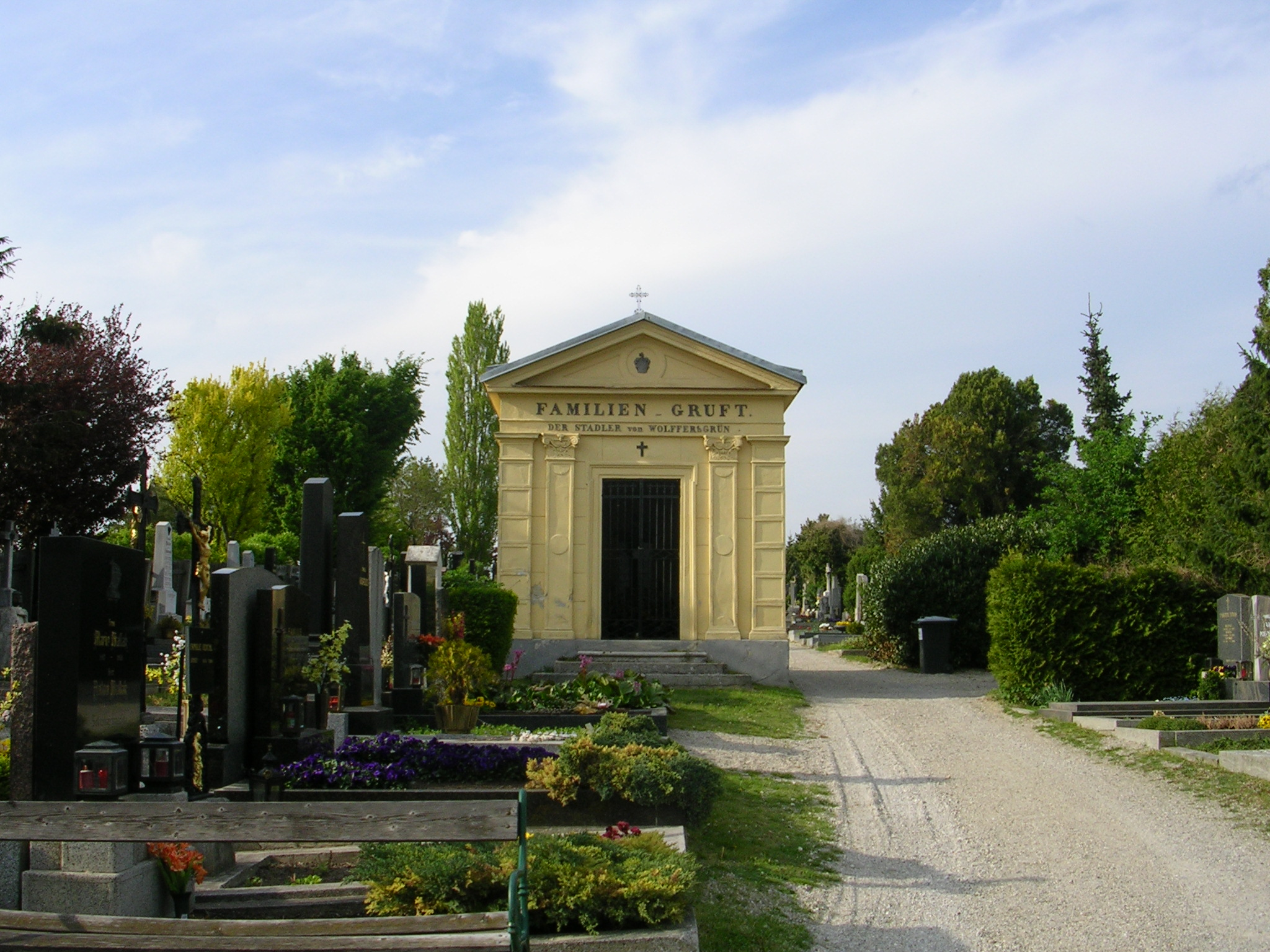 Old cemetry of Stammersdorf (Friedhof Stammersdorf Ort) in Stammersdorf (Wien)